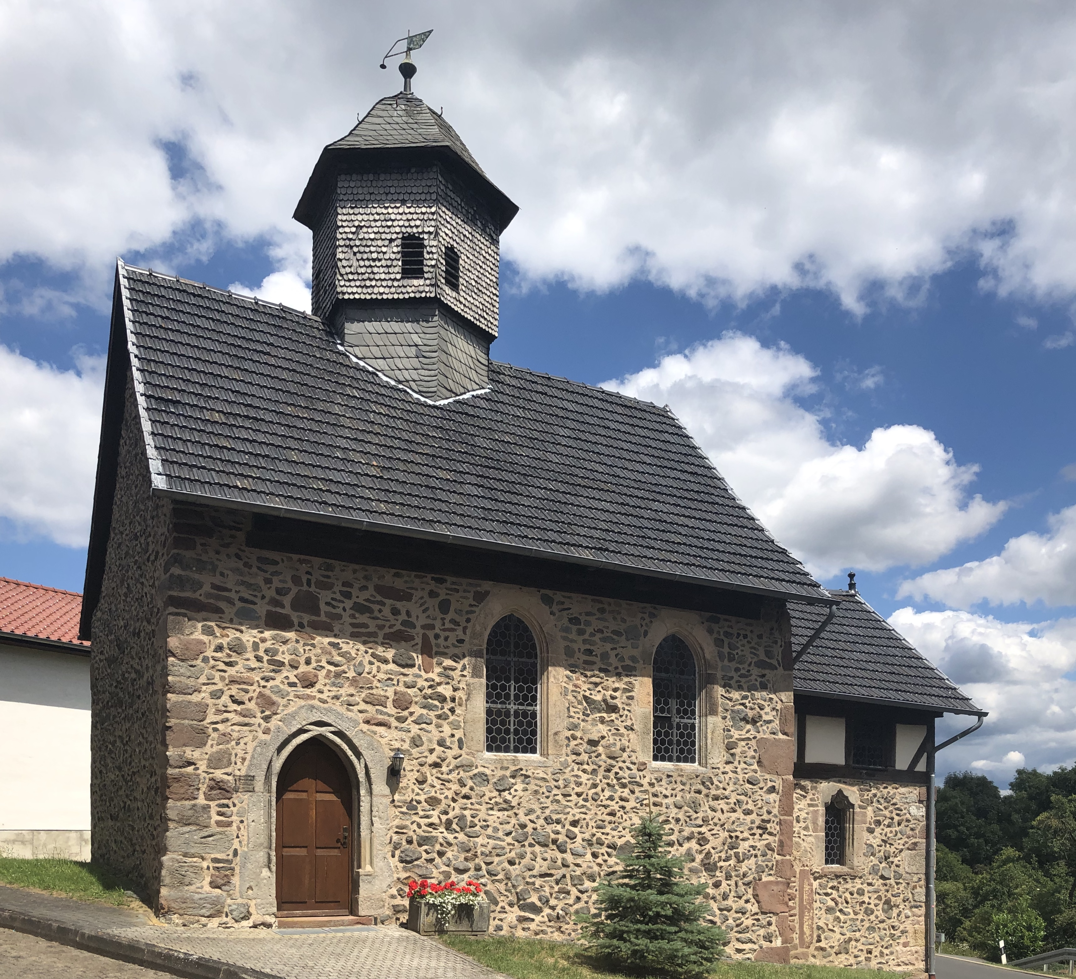 Ortskirche